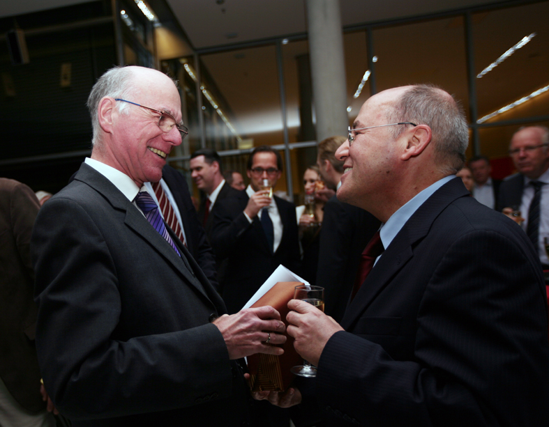 Geburtstagsempfang zum 65. von Gregor Gysi im Reichstagsgebäude